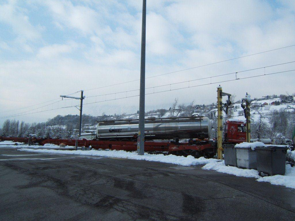 Système, train et wagon Modalohr, plateforme d'Aiton, Savoie, France